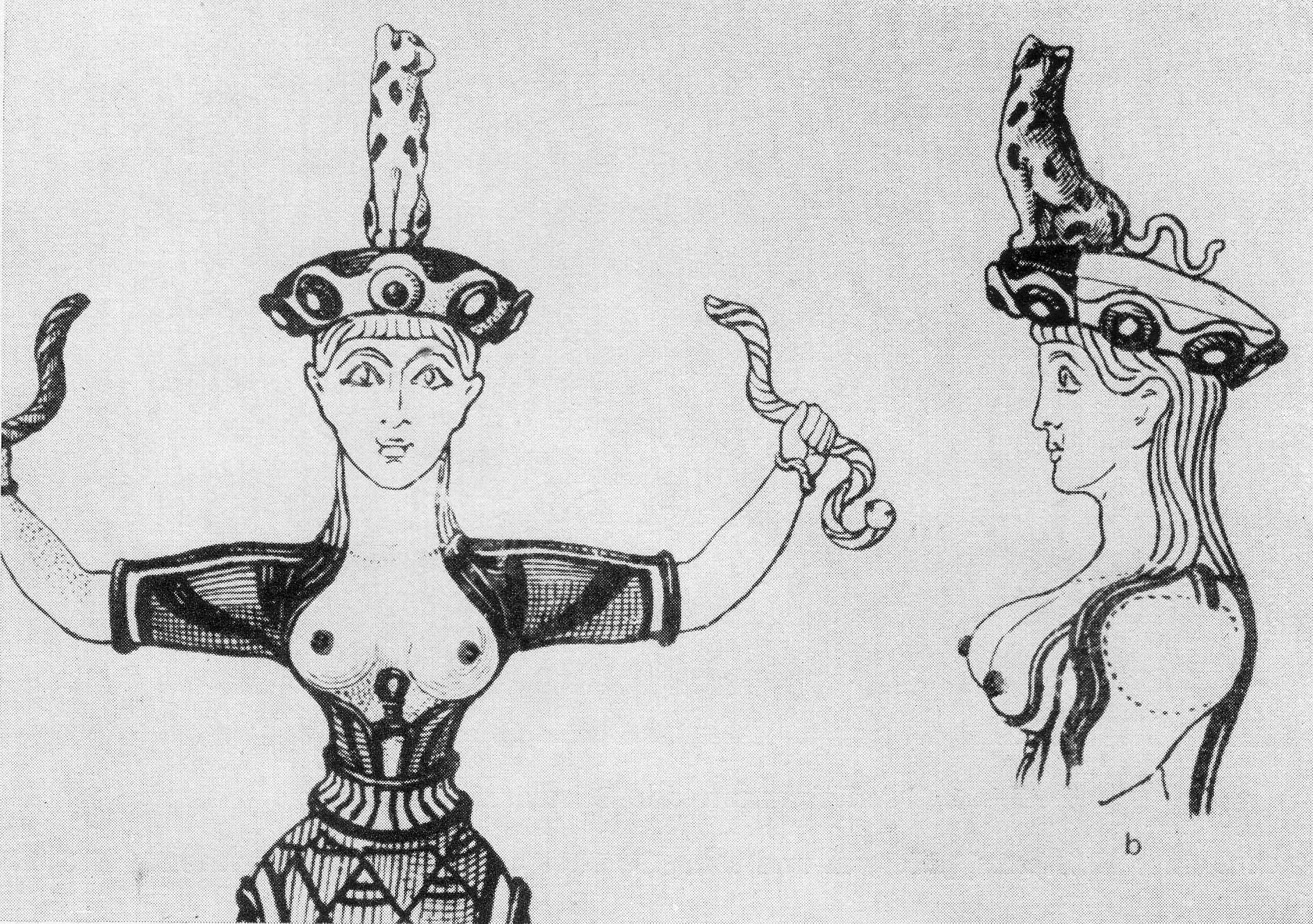 Bildunterschrift: Kretische Priesterinnen mit Leopardenhut, 1600 v. u. Z., Knossos. Nach E. Evans (Arthur Evansǃ) „The Palace of Minos“, I London 1921, Fig. 362, S. 504.